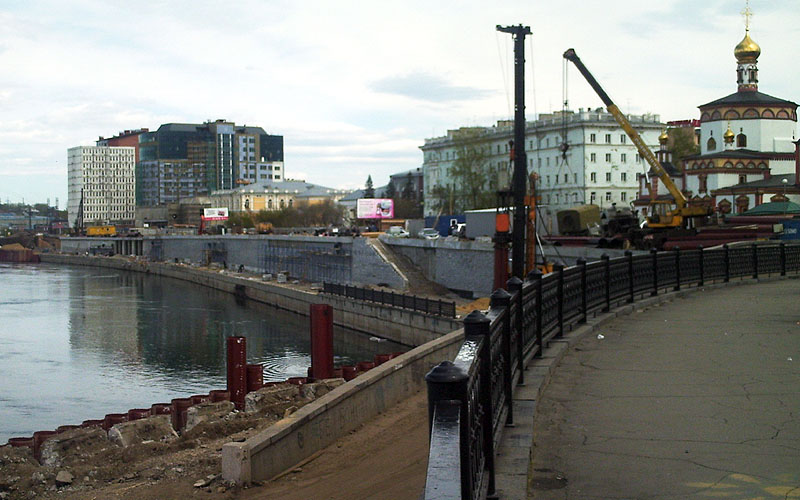 Берегоукрепление Ангары и реконструкция улицы Нижней набережной Ангары в Иркутске